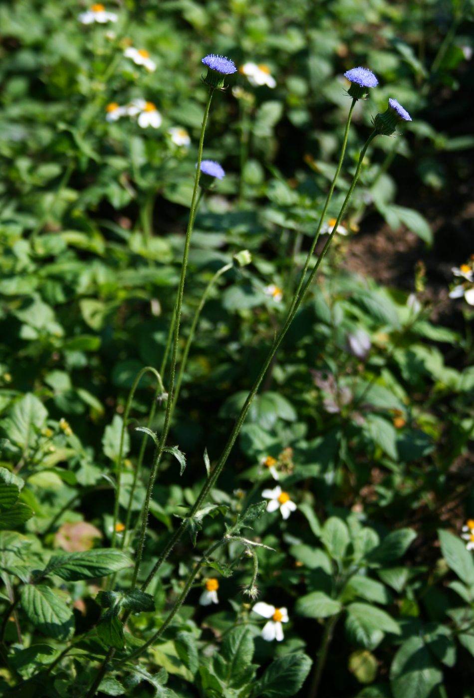 Crassocephalum rubens, Korbblütler (Asteraceae) - Vietnam/Việt Nam: Pa So, Phong Thổ (Prov. Lai Châu)